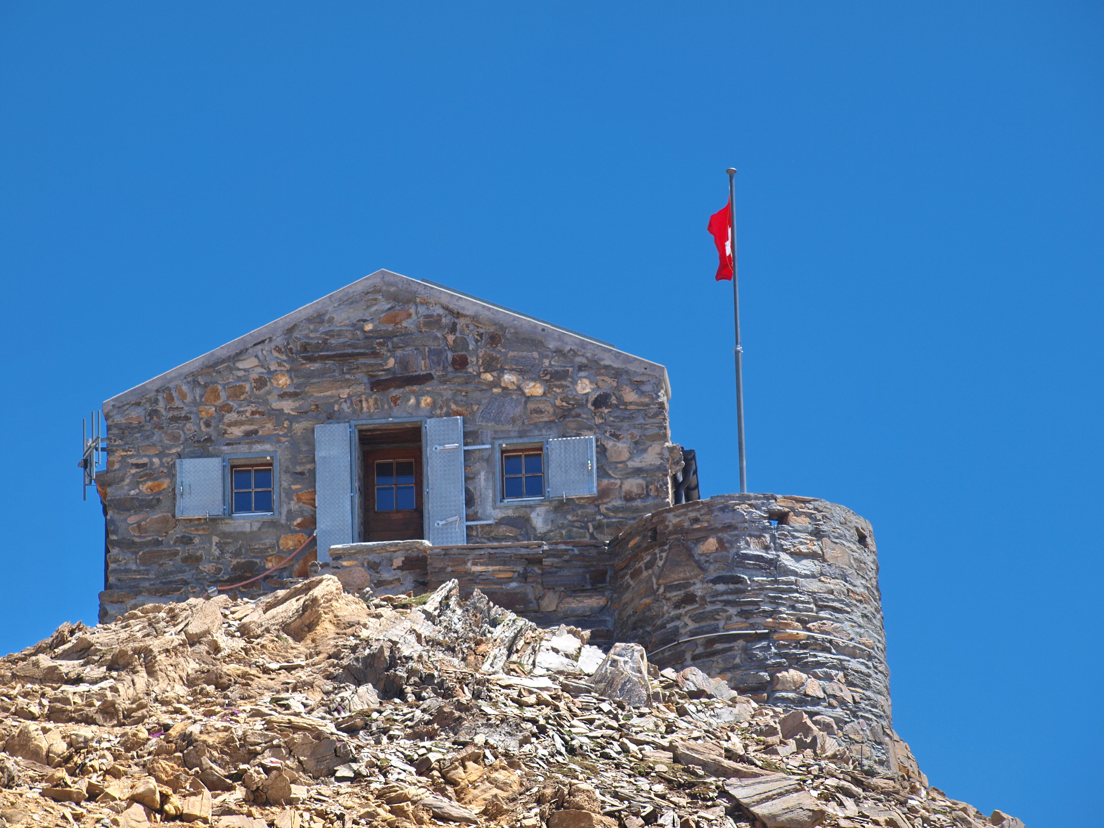 Monte Leone Hütte oberhalb des Simplonpasses